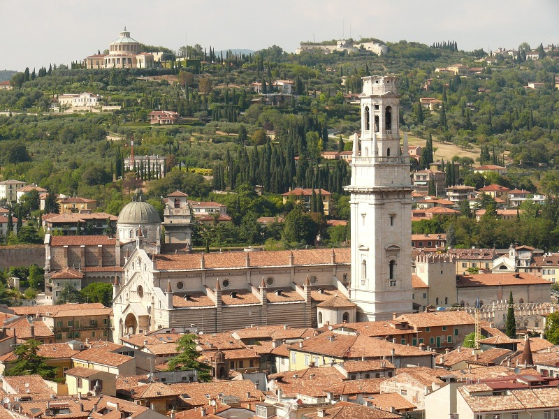 Original image description from the Deutsche Fotothek Blick vom Torre dei Lamberti auf den Dom mit Glockenturm